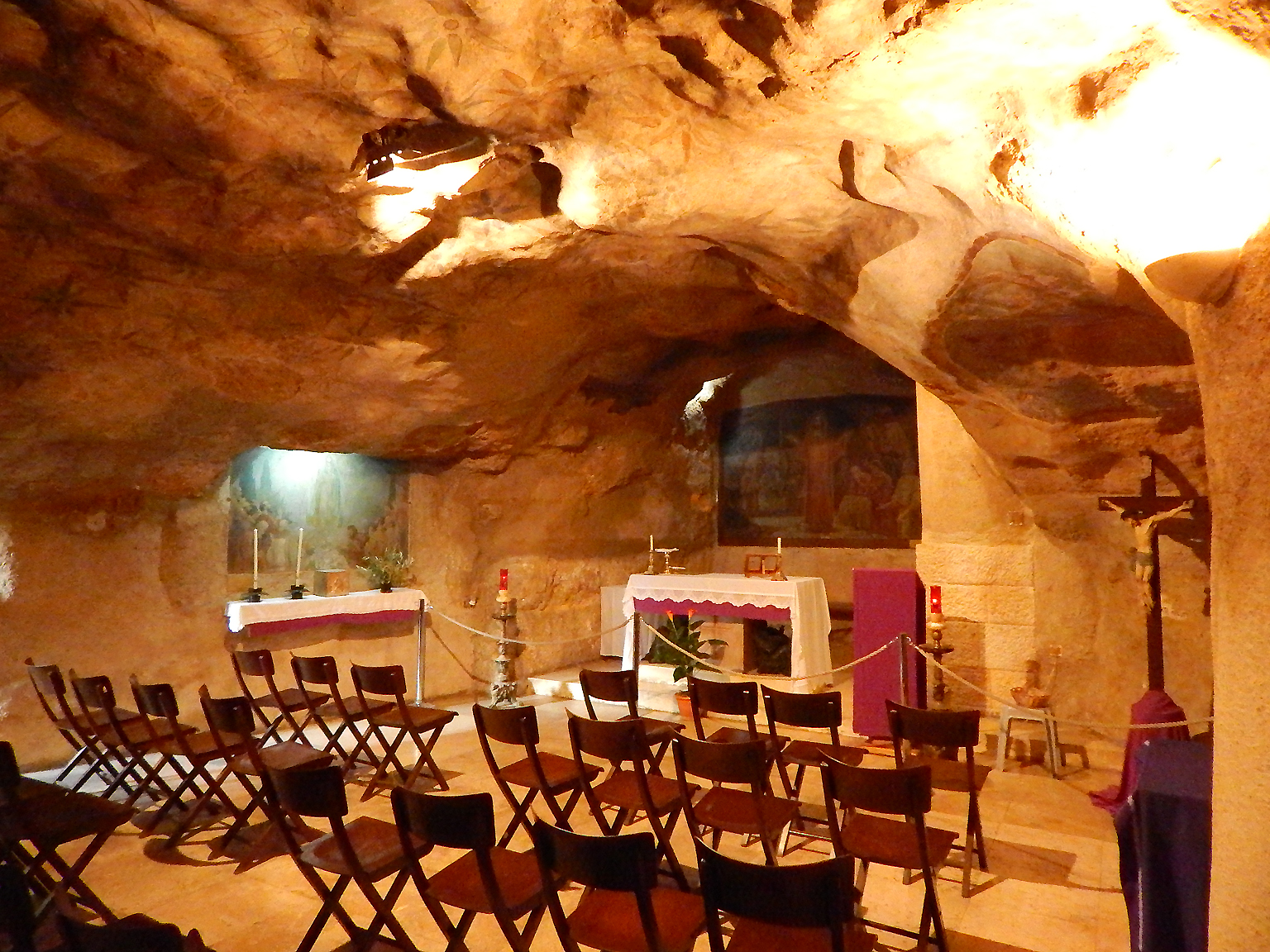 Jerozolima, Grota Pojmania Jezusa, Grota Getsemani